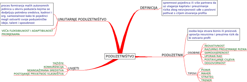 Mentalna mapa s obilježjima poduzetništva